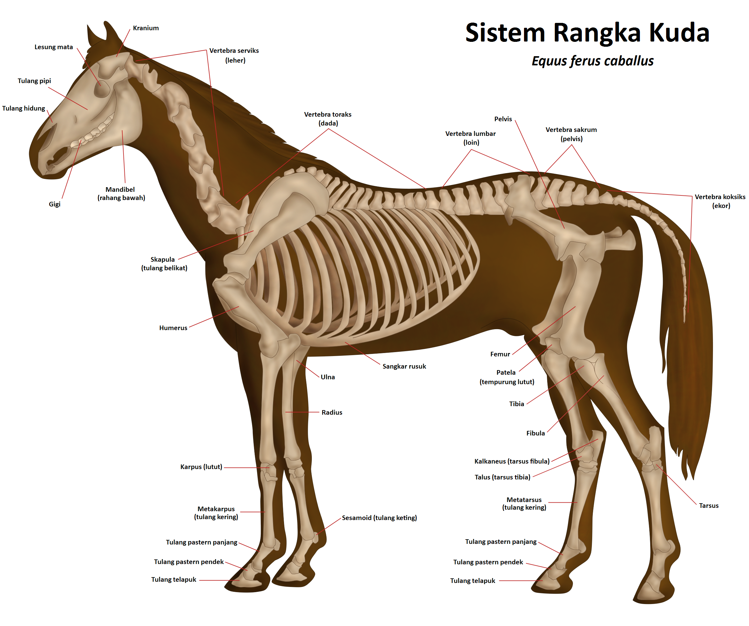 Sistem rangka Equus caballus (kuda am).